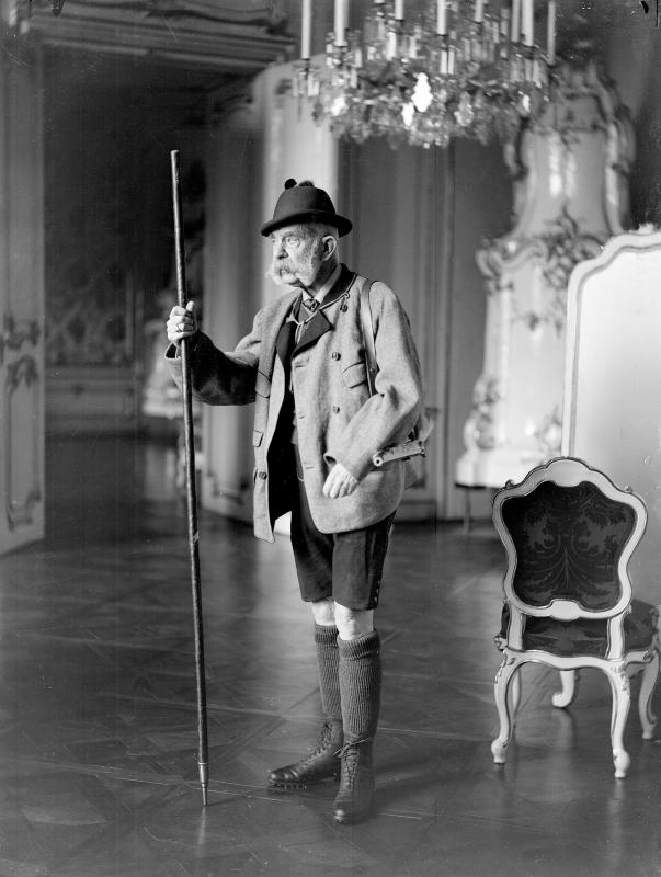 Kaiser Franz Joseph I, porträtiert als Jäger, mit Bergstock unter Kronleuchter, vermutlich in Schönbrunn. Aufnahme von Wenzl Weis, 1910.